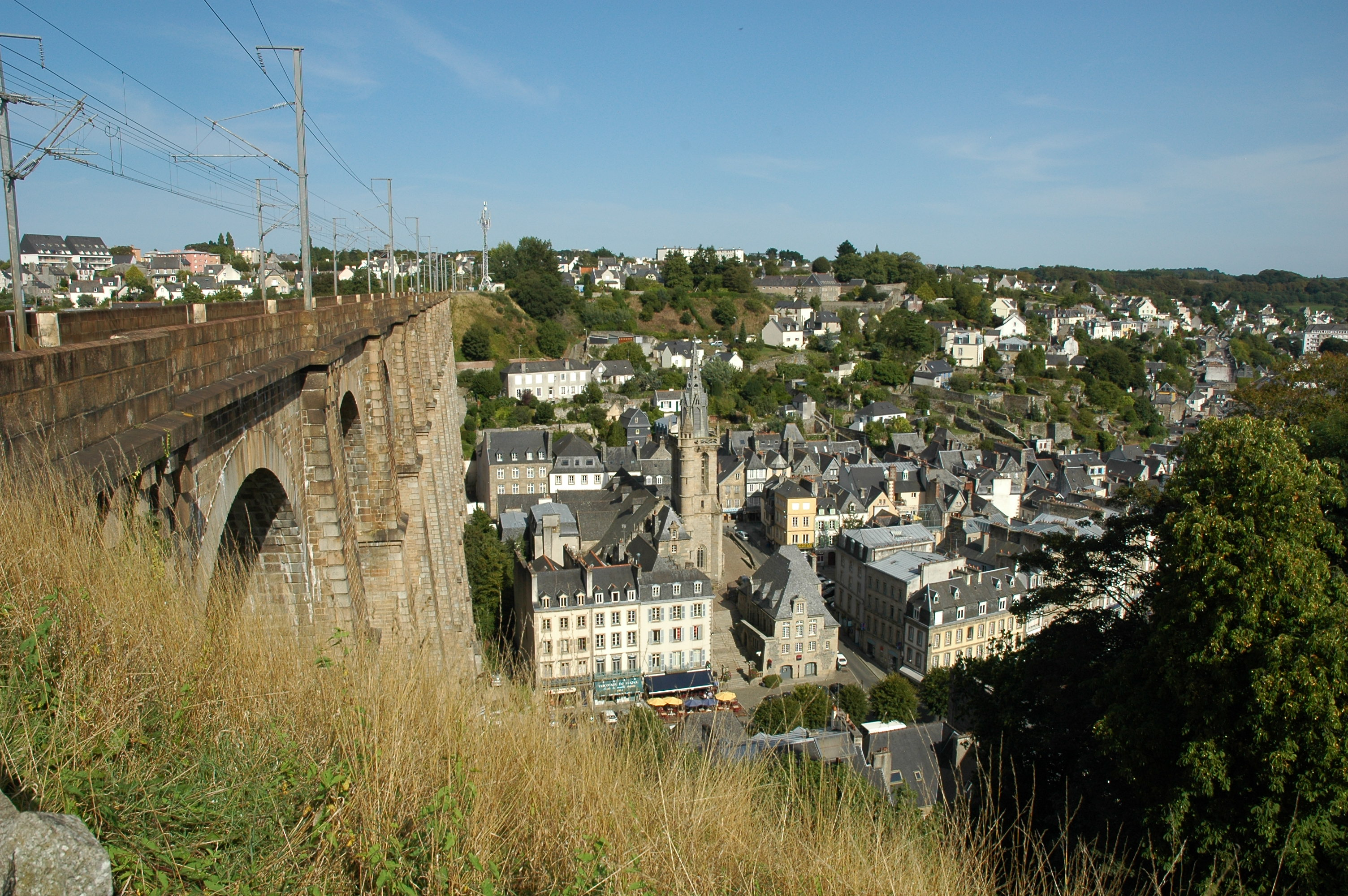 Morlaix, vue du gare, Finistère, France